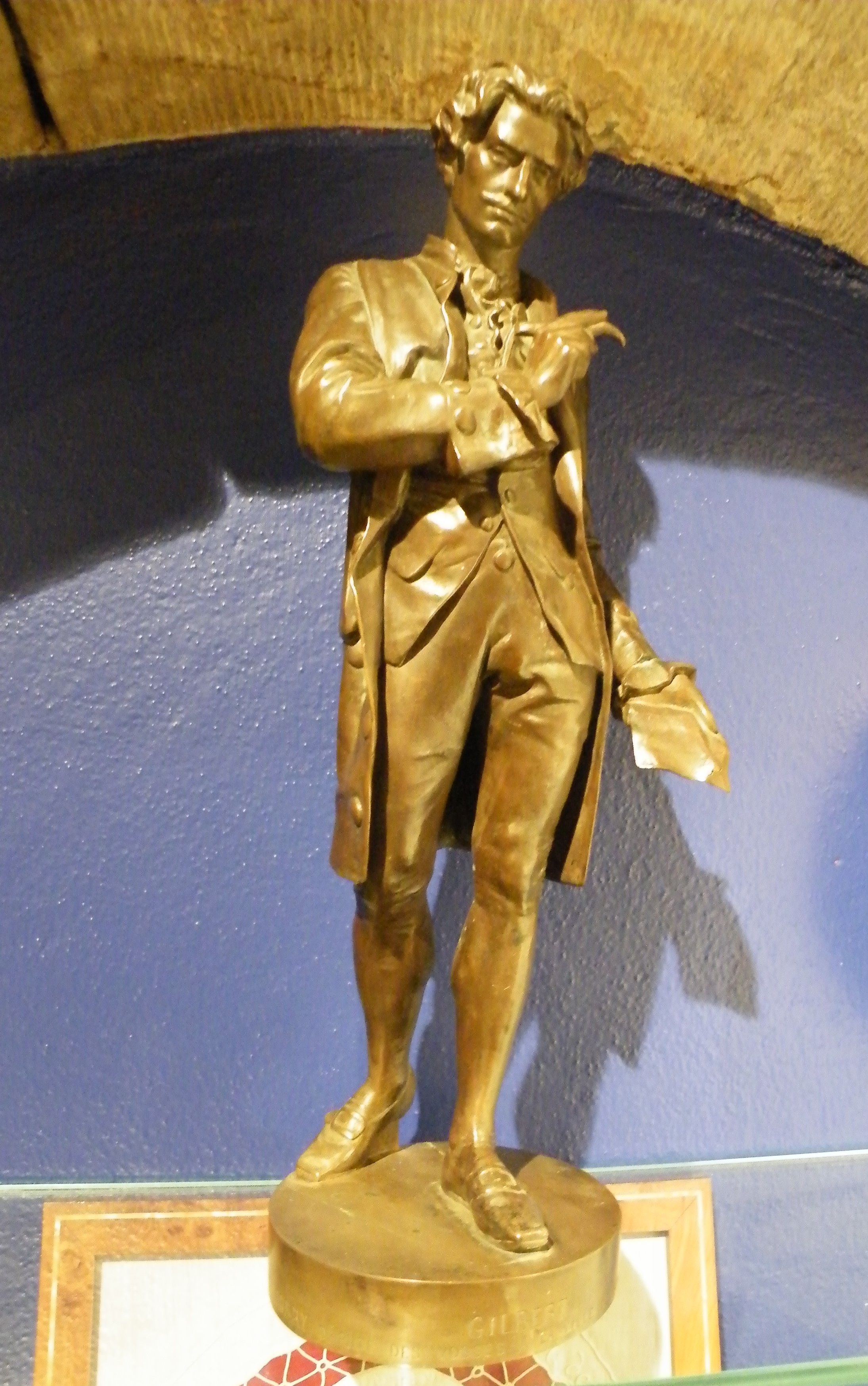 Statue bronze du poète Gilbert par Cadé, réduction système A.Collas, fonte de Barbédienne, musée de la Broderie de Fontenoy-le-Château.